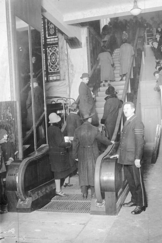 Scherl: 22.12.1925 Bei Herrman Tietz in der Leipziger Strasse. Berlins erste Rolltreppe in Betrieb genommen.